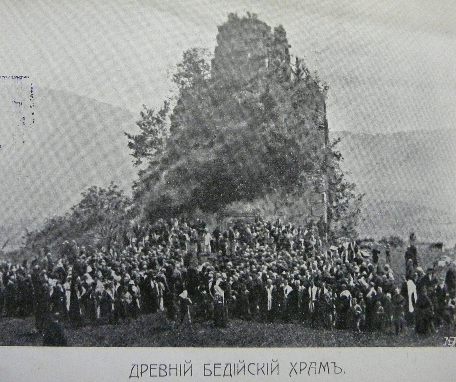 Бедийский собор (храм) (фотография датируется, предположительно, концом XIX - началом XX вв.). Источник: О Бедийском Храме/ Сост. О.Ермолаева. - Сухум: Типография Я.А.Шейнберга, 1913 (на внутренней обложке - 1912). - Вкладка. (Издание Сухумской Церковно-Археологической комиссии)